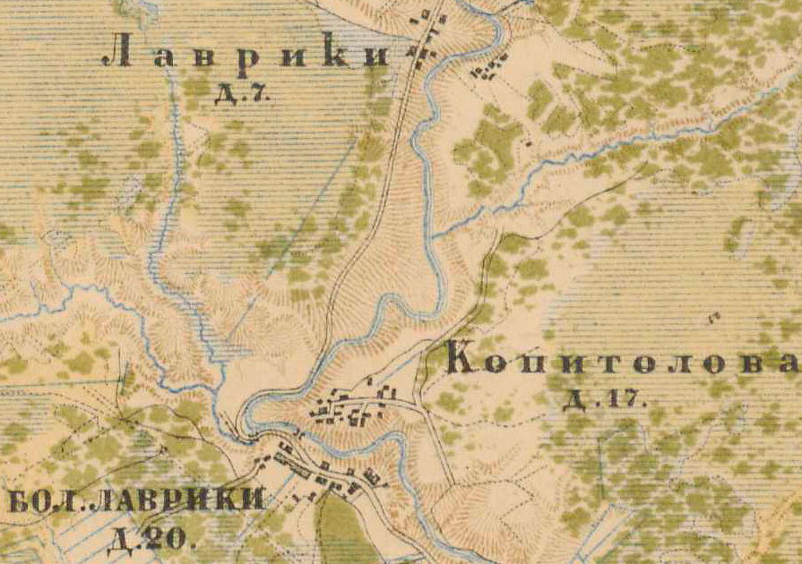 Лаврики на карте 1885 года.